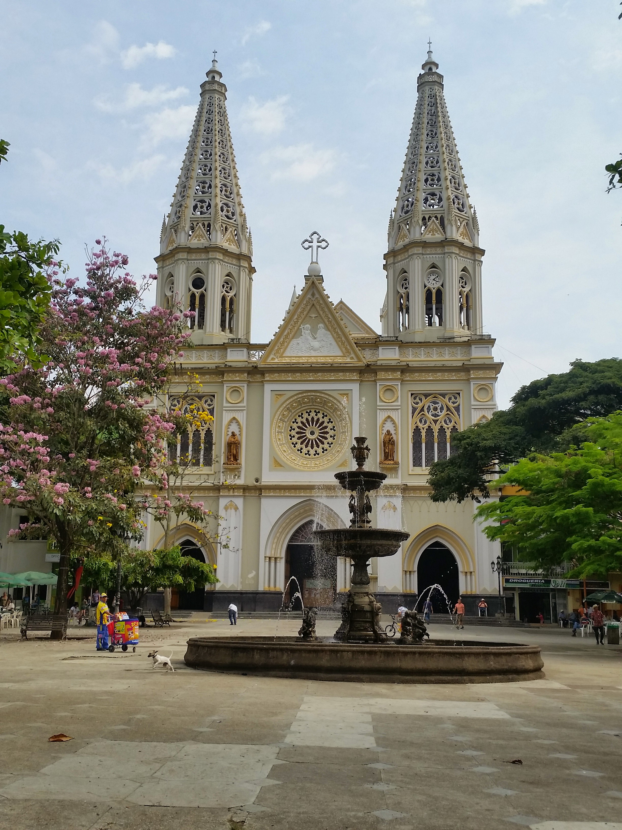 Iglesia Nuestra señora de las Mercedes Andes